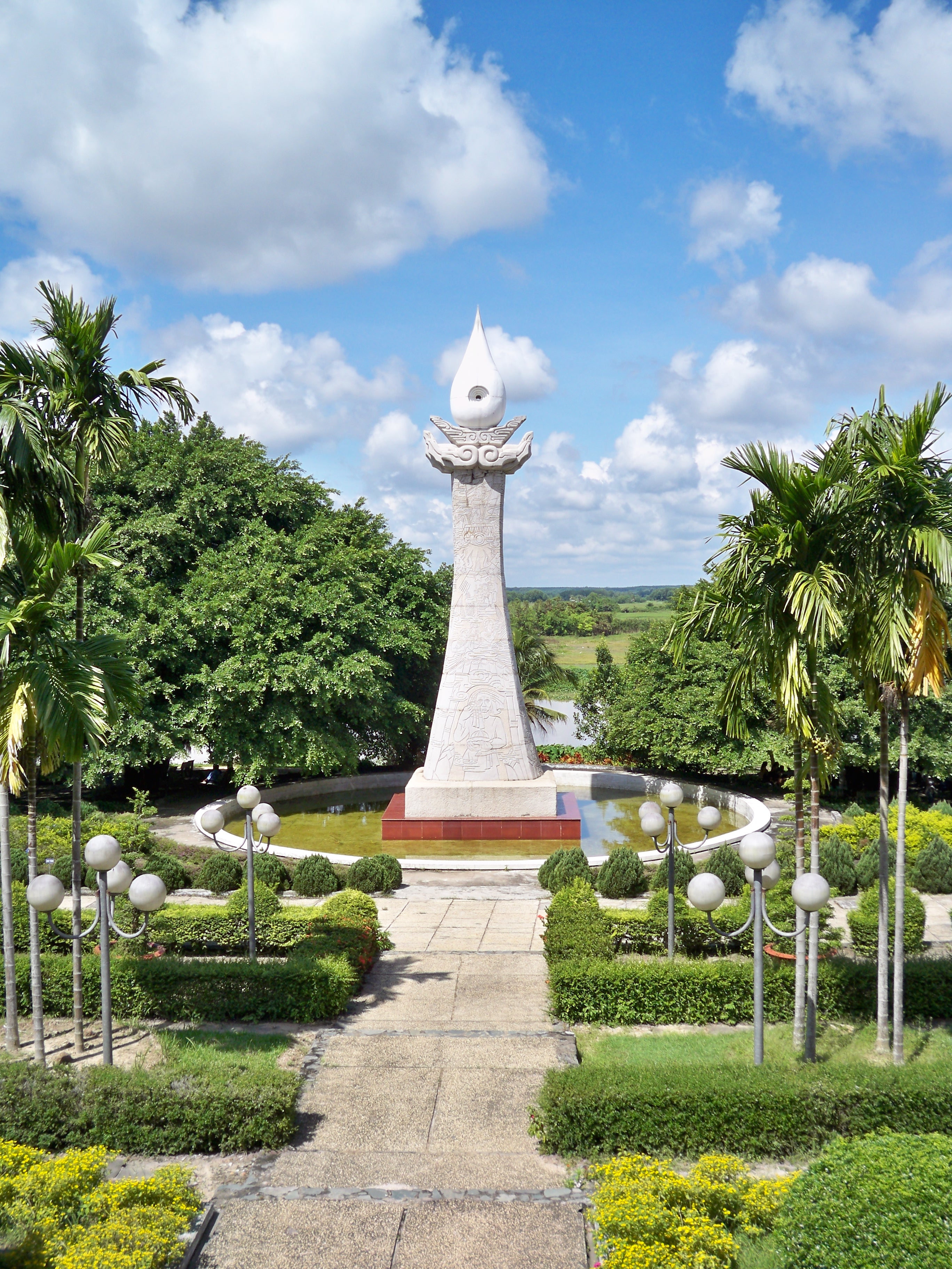 Phan Minh Châu chụp tại đền Bến Dược cùng học sinh chuyên Trần Đại Nghĩa